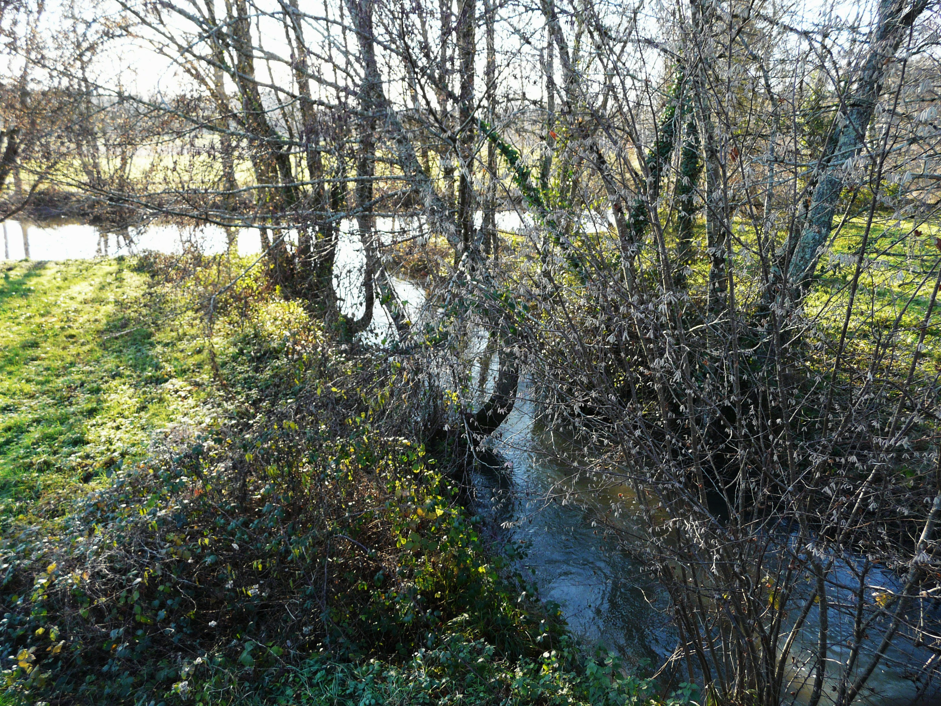 Le confluent du Trincou et de la Côle (qui coule de gauche à droite au fond), Condat-sur-Trincou, Dordogne, France